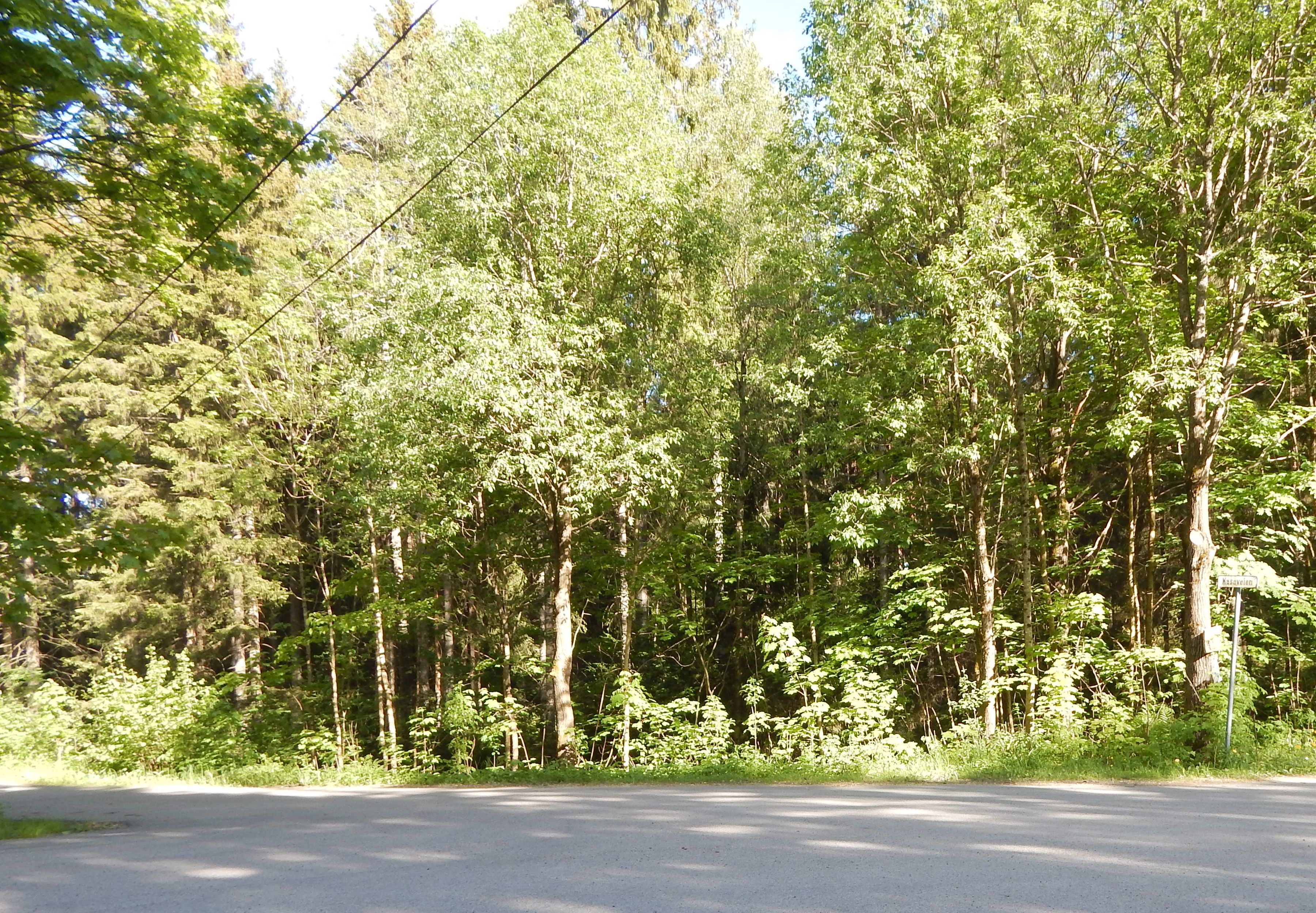 Kasaveien sett fra Gamle Maridalsvei